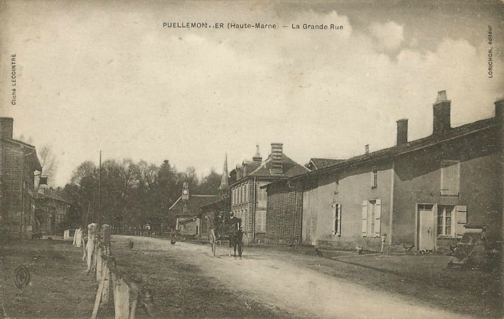 Une rue du village vers 1920.